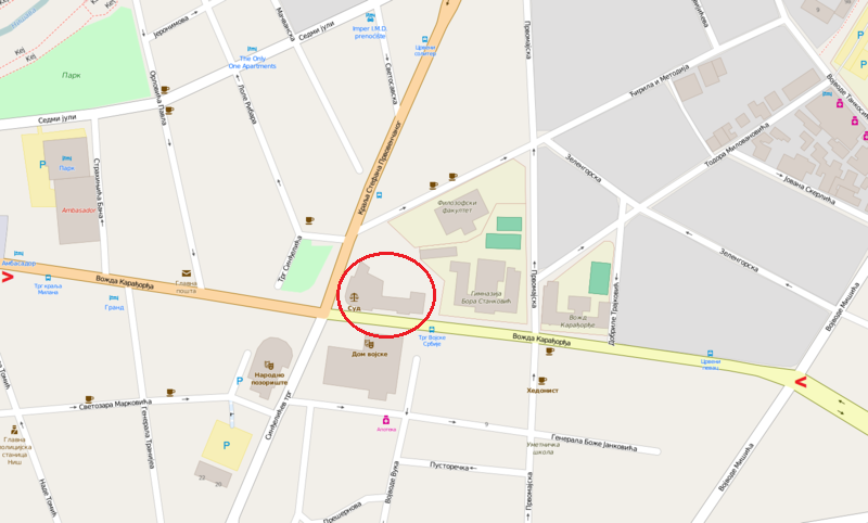 Položaj zgrada Sreskog načelstva u Nišu, na mapi Niša